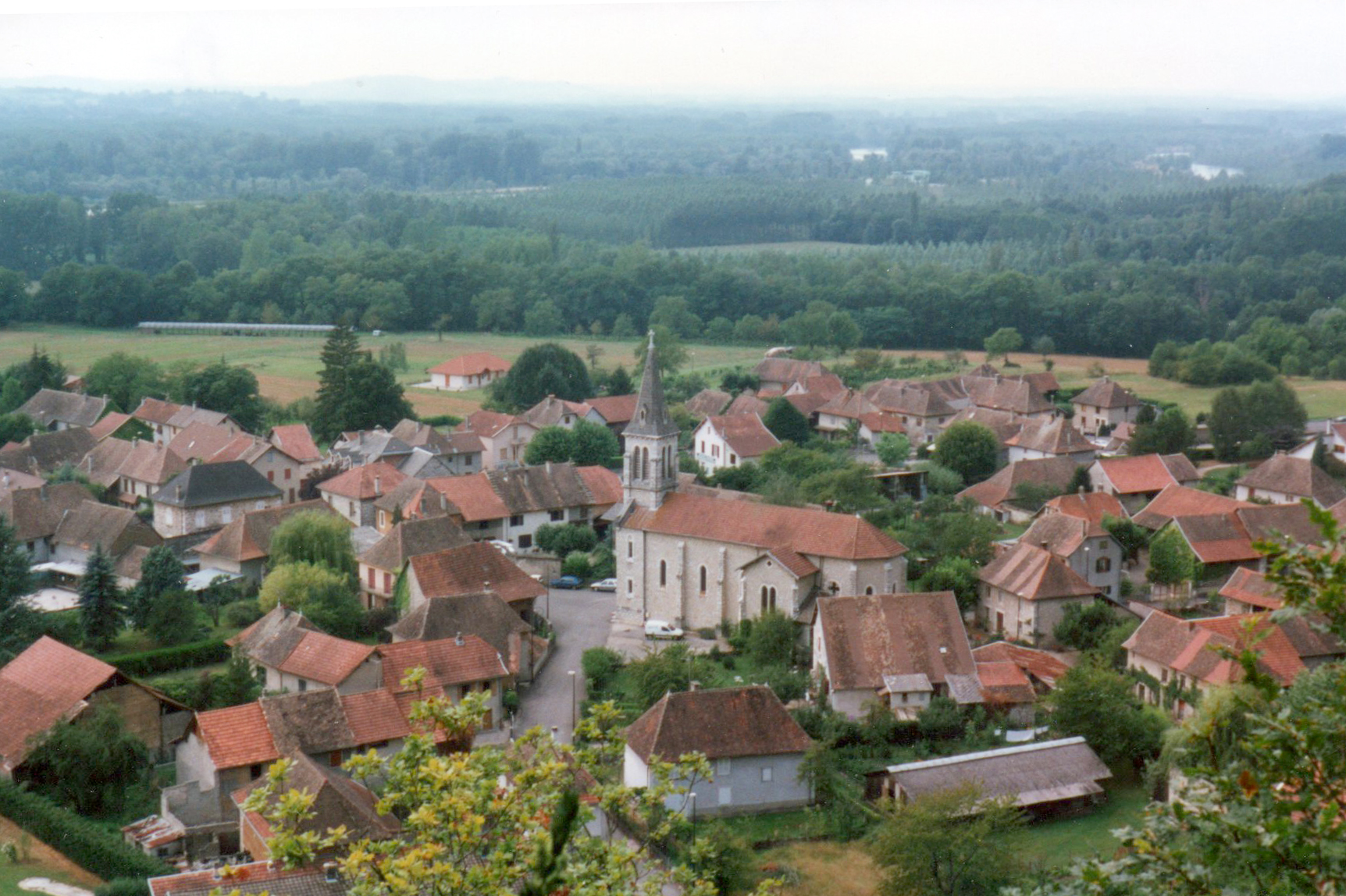 Le village de Brégnier (Brégnier-Cordon, Ain) vu de la montagne.